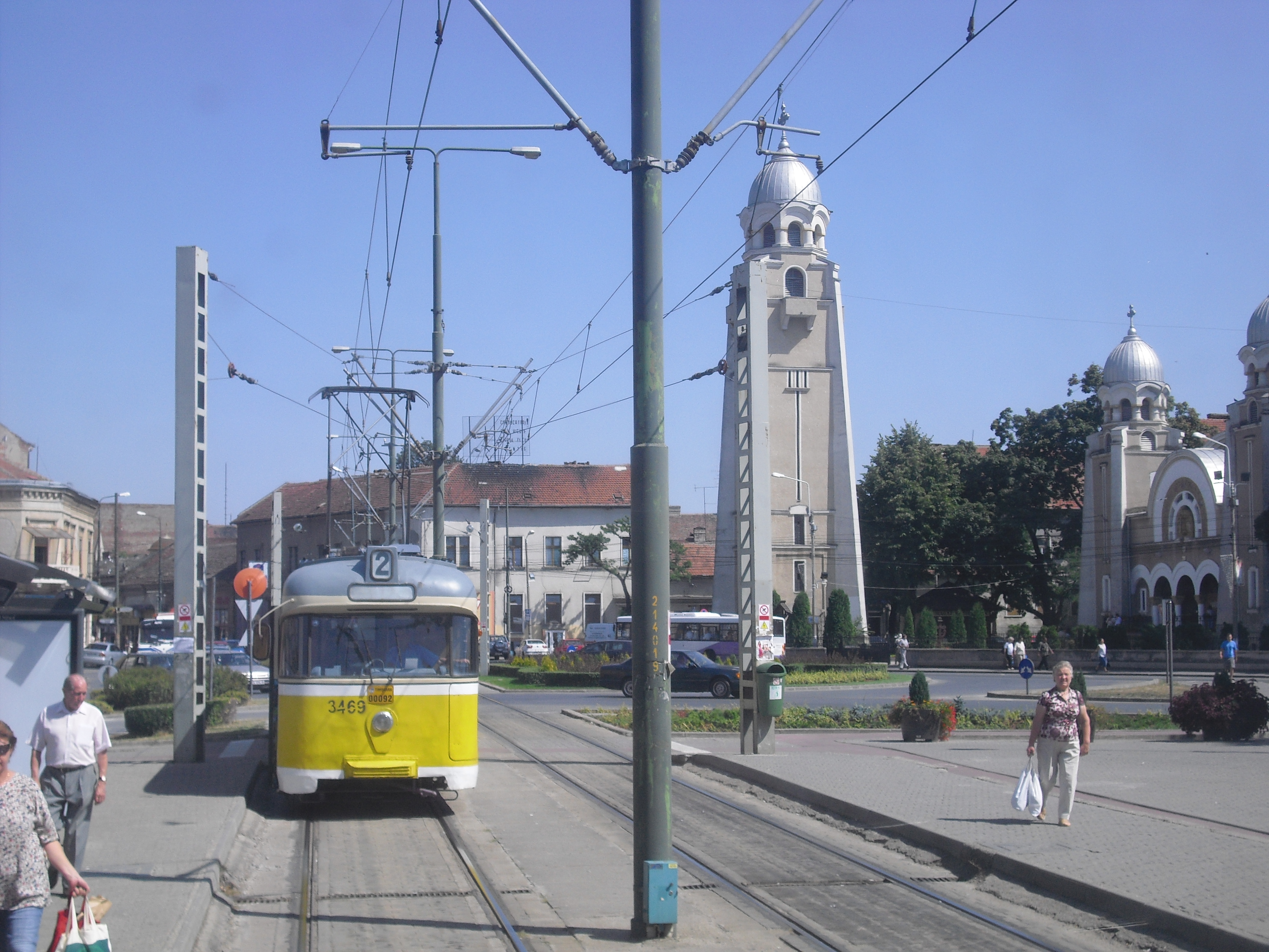 Straßenbahn in Timişoara (Rumänien)